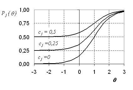 ICC в трехпараметрической модели 3PL